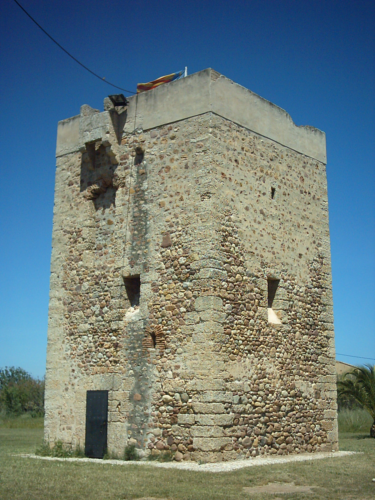 Torre del Mar (Borriana)